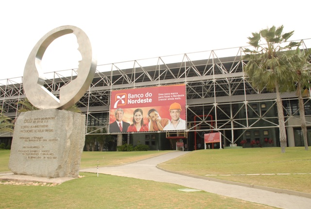 Praça da moeda na sede administrativa do Banco do Nordeste em Fortaleza